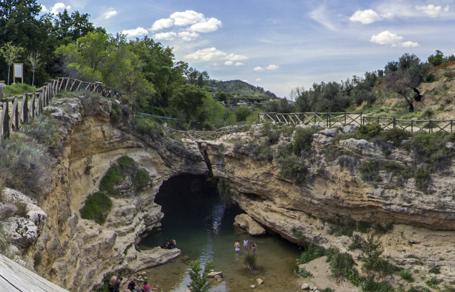 Panorama del Salto de Usero, Rio Mula, una de las 7 maravillas de Murcia. Situado en el municipio de Bullas, en la ladera del cerro del Castellar. comarca del noroeste de la región de Murcia. This is a photography of a Site of Community Importance in Spain with the ID: ES6200045. Natura2000 entry, EEA entry